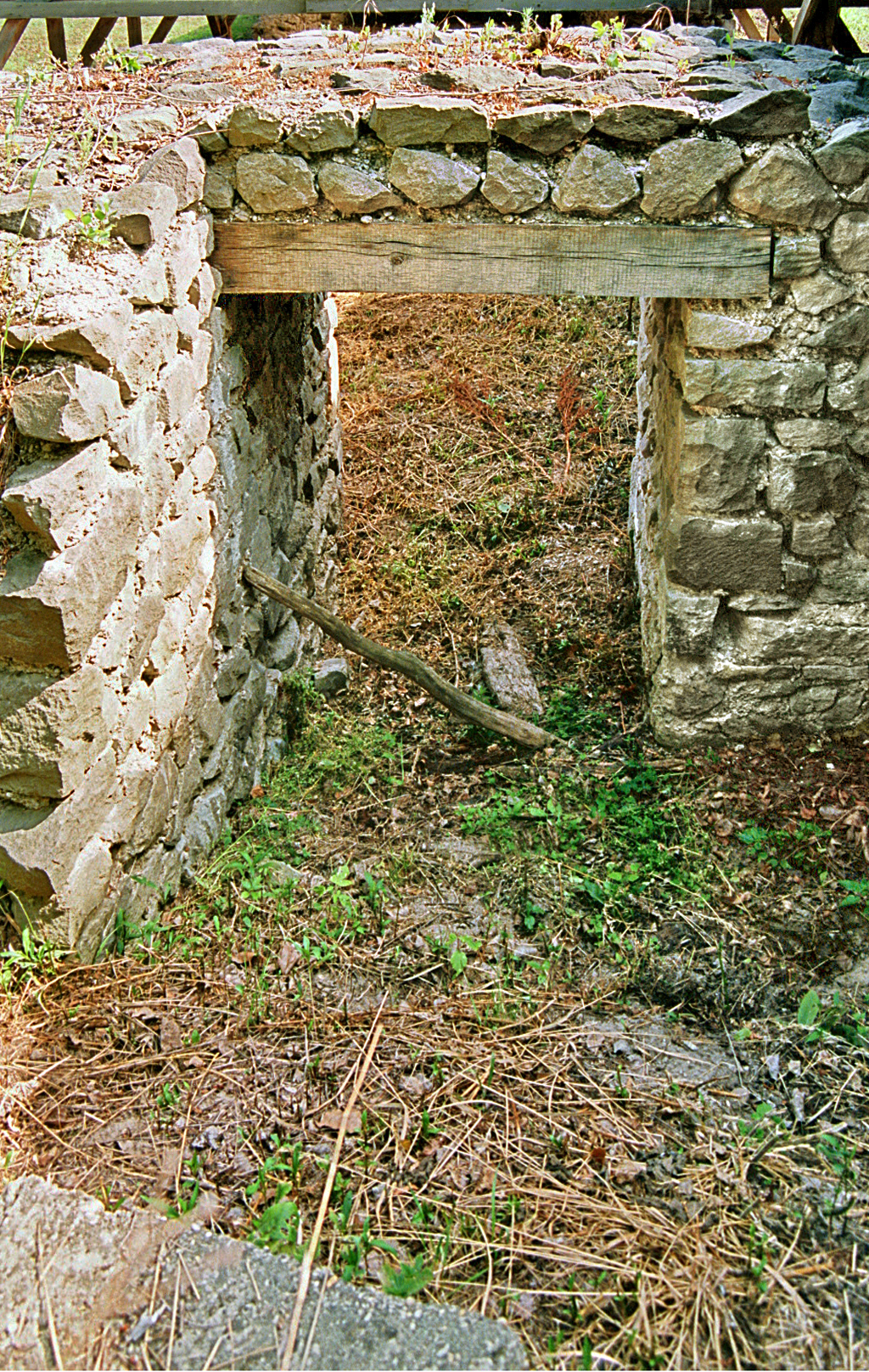 Kastell Visegrád–Gizellamajor - Nordwestausgang zum Innenhof.